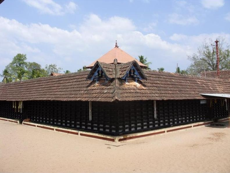 നാല്പത്തെണ്ണീശ്വരം-നാലമ്പലം